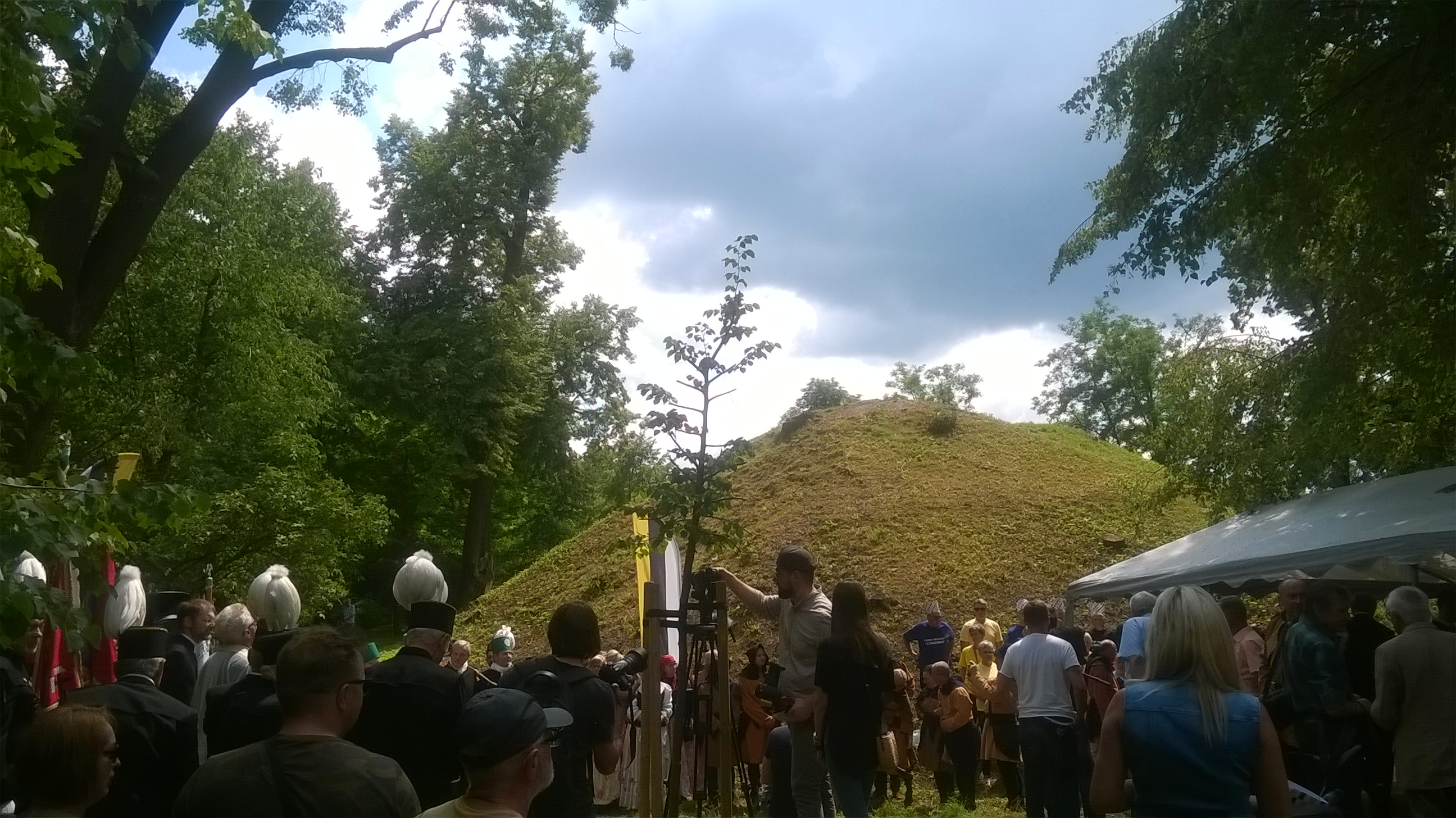 Impreza plenerowa "Barbórka w środku lata" w parku Kunszt w Tarnowskich Górach